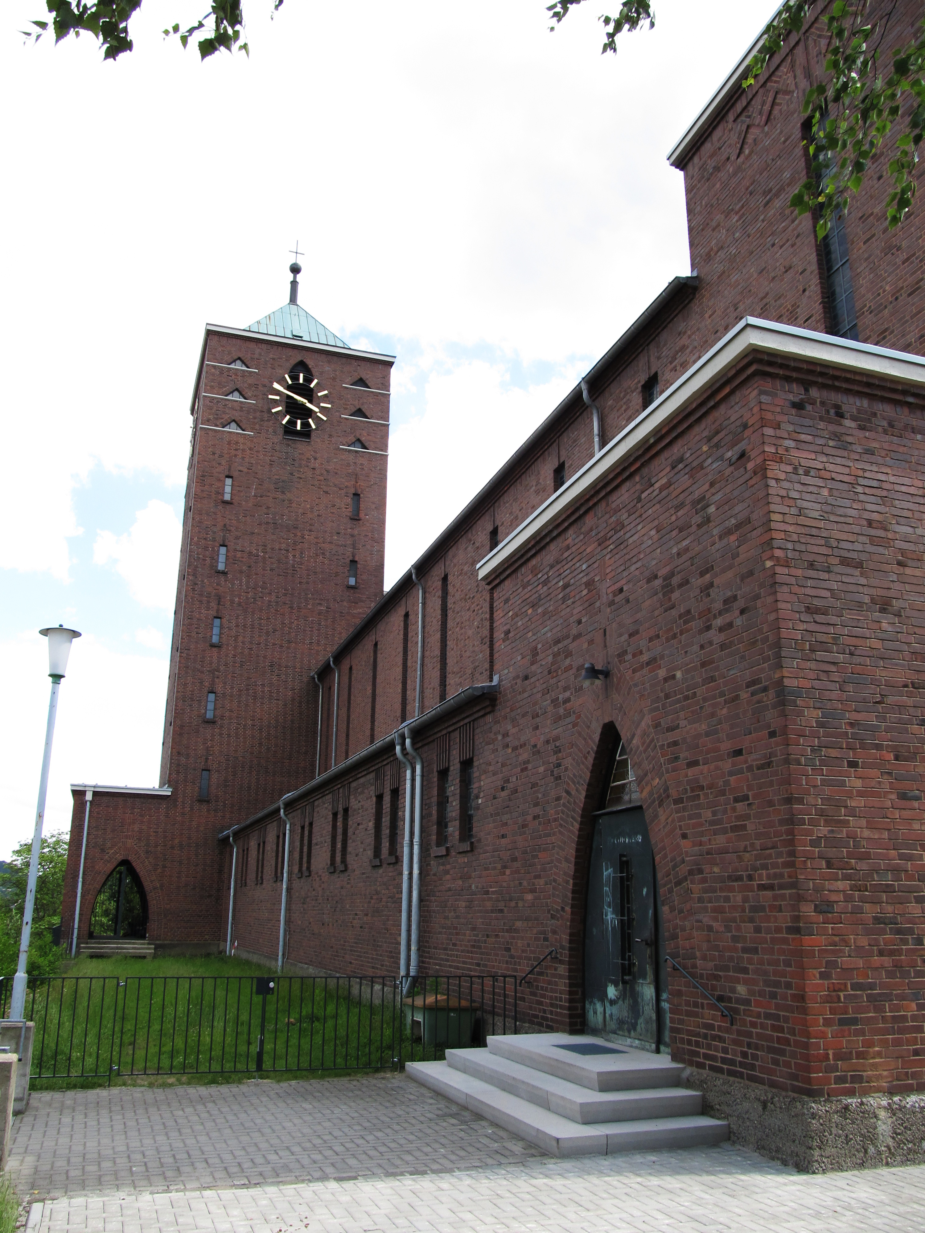 Blick entlang des nordlichen Seitenschiffes zum Glockenturm der St. Hildegardskirche in St. Ingbert, Saarland